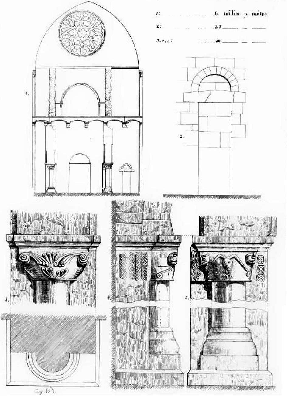 Détails du massif occidental : vestiges du premier projet de façade de la fin du Xe siècle ou du début du XIIe siècle. N° 1 : raccordement du massif occidental à la nef.